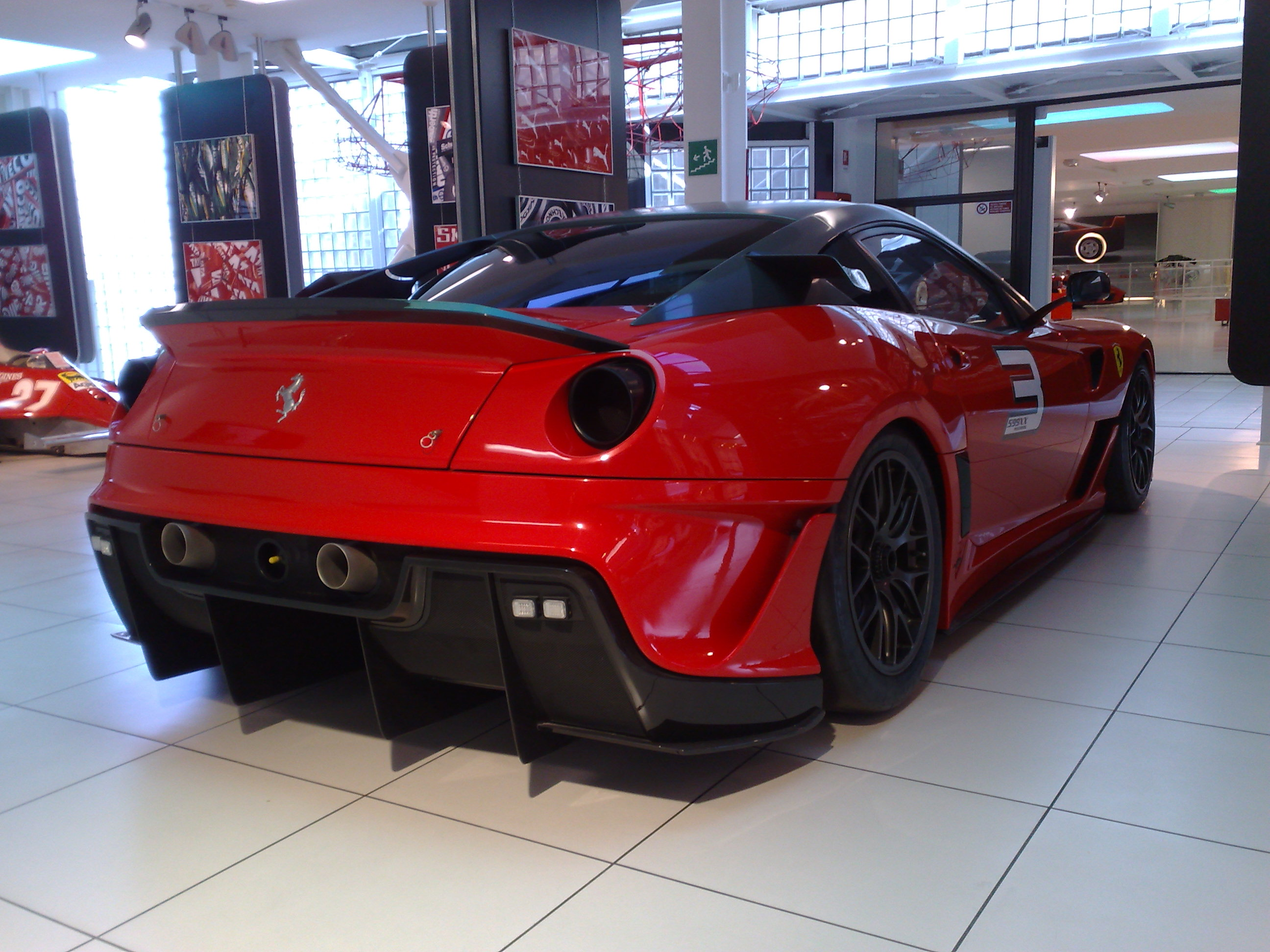 Ferrari 599XX, Galleria Ferrari, Maranello